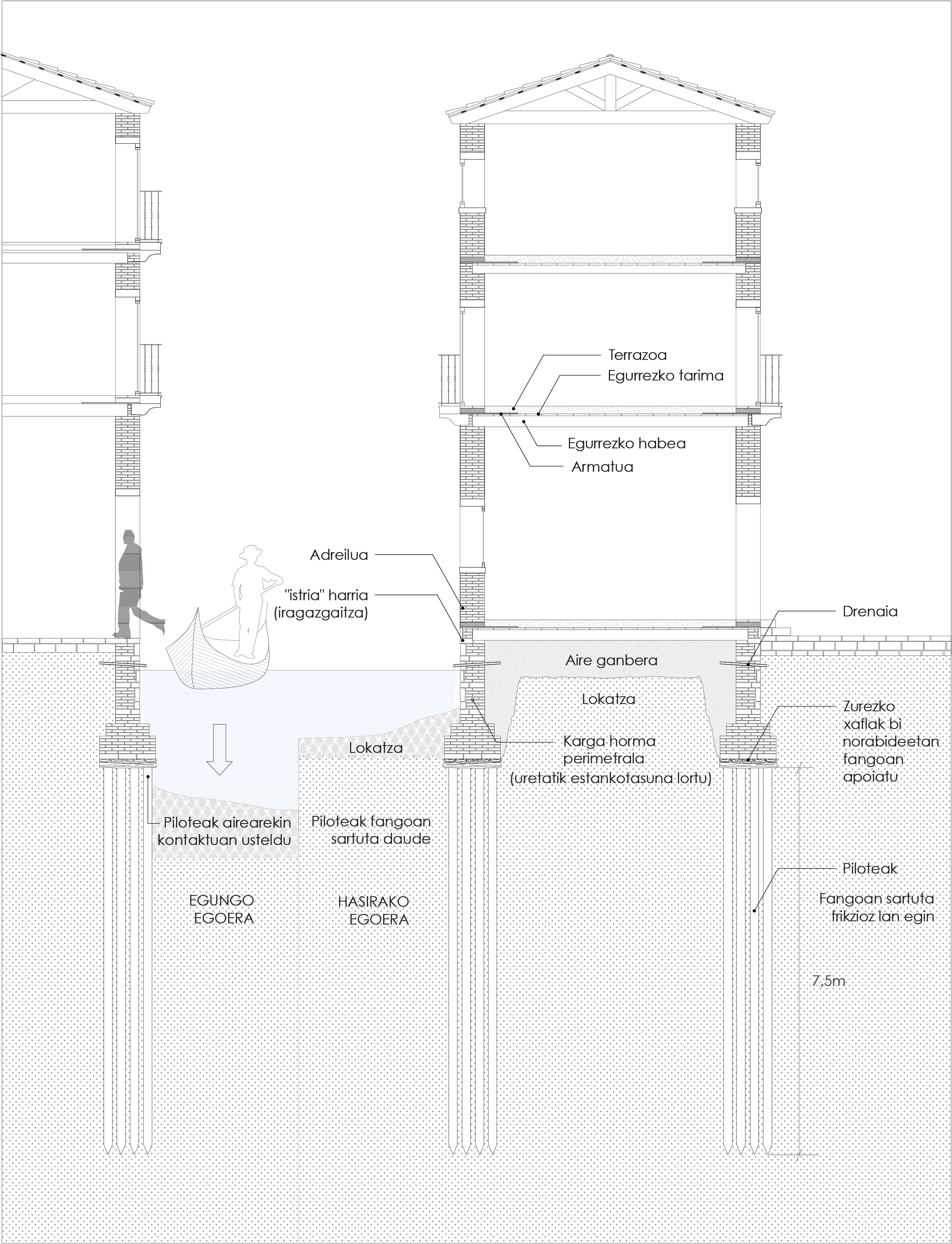 Veneziako eraikinen eraikuntza-sistemaren ebaketa